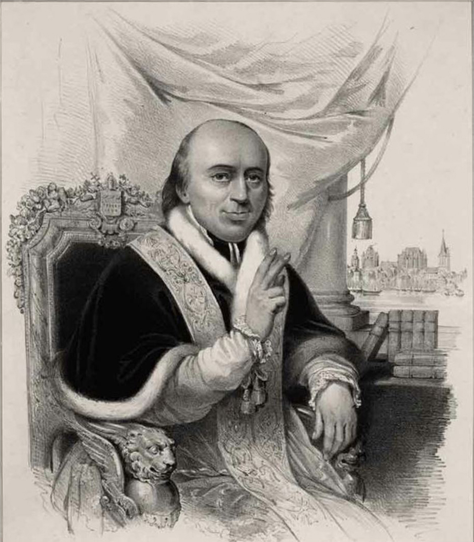 Charles Baugniet. Portrait de Clemens-August von Droste-Vischering, archevêque de Cologne